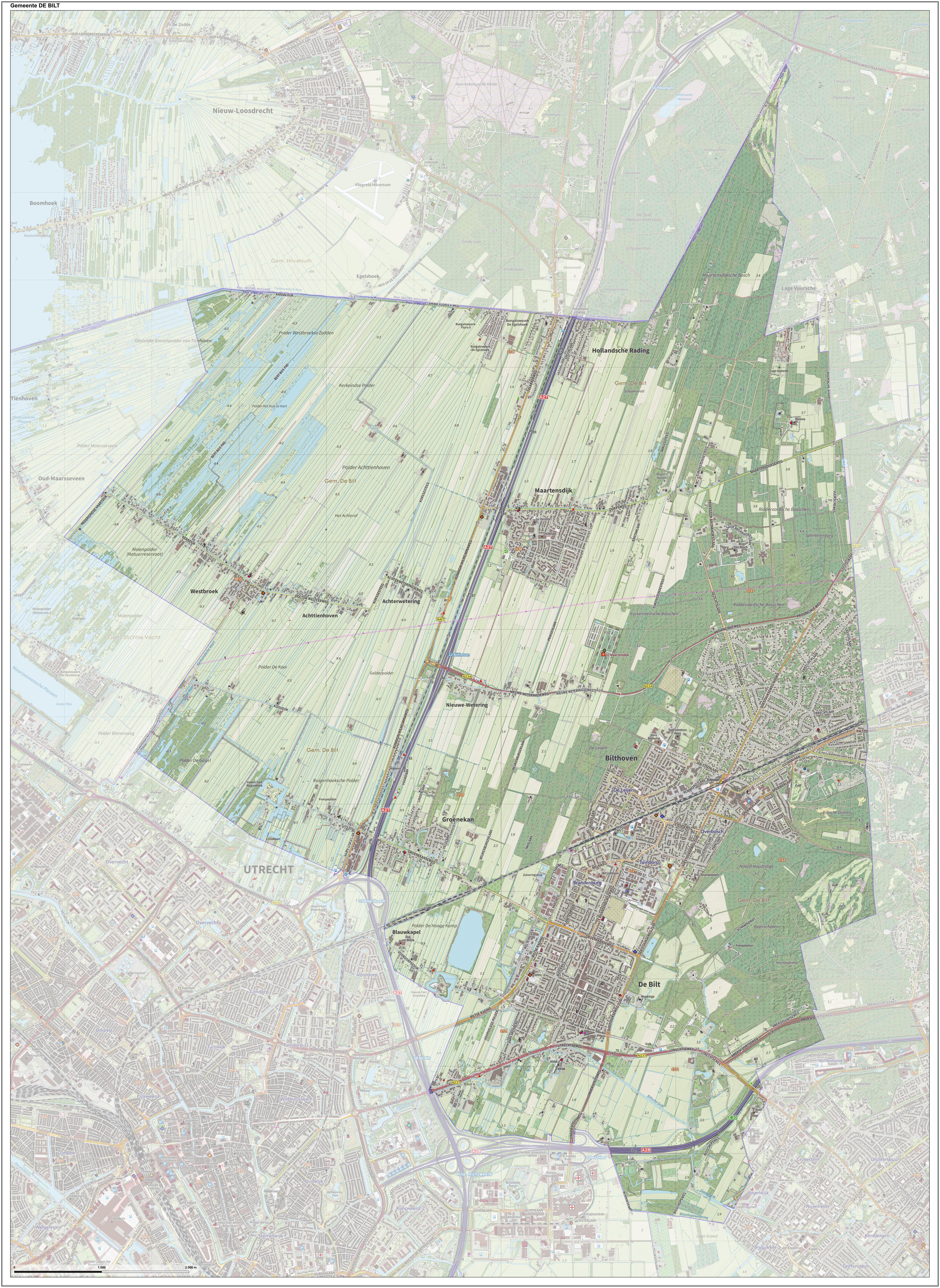 Topografische gemeentekaart. Resolutie: 400 pixels/km. Kaartbeeld samengesteld uit de open geodata van de Top10NL en Top25namen (Kadaster), Creative Commons-BY licentie. Gebouwvlakken uit open geodata BAG extract. Wegen uit de OpenStreetMap, OpenStreetMap community. Reliëfschaduw uit de Actuele Hoogtekaart AHN2. Samenstelling en kleurenschema: Jan-Willem van Aalst, met QGIS. Zie ook de Legenda.